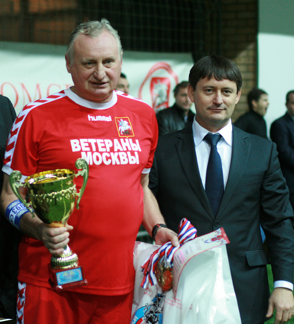 Юрий Гаврилов и Александр Старцев на праздновании столетия Московской Федерации футбола